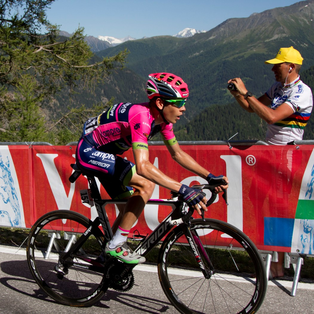 243 meyntjes